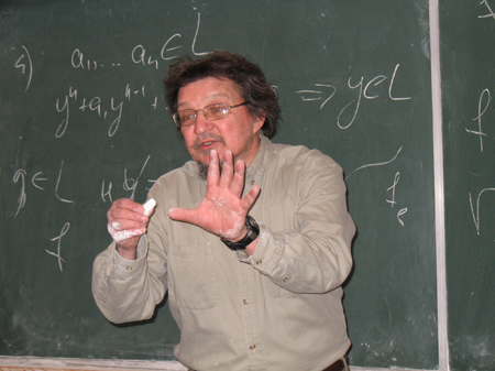 Фотография А.Г. Хованского